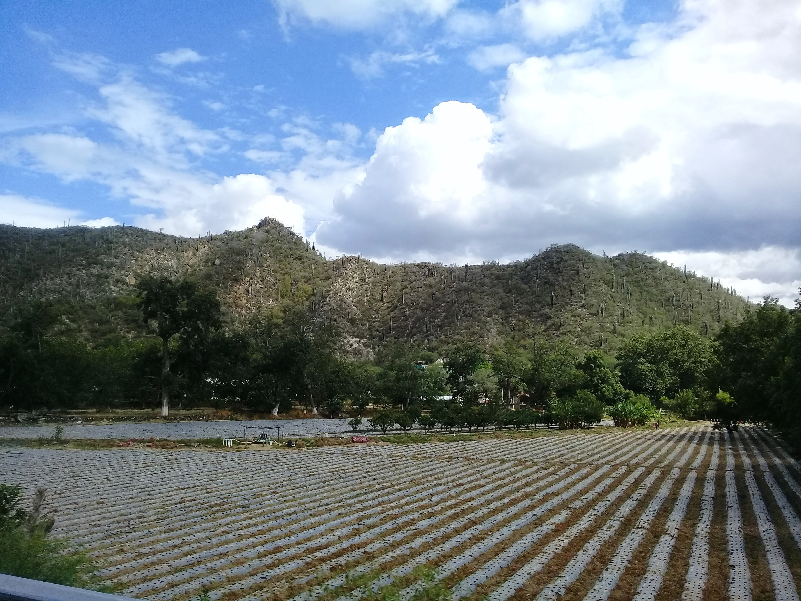 Camino a Metztitlán. 001